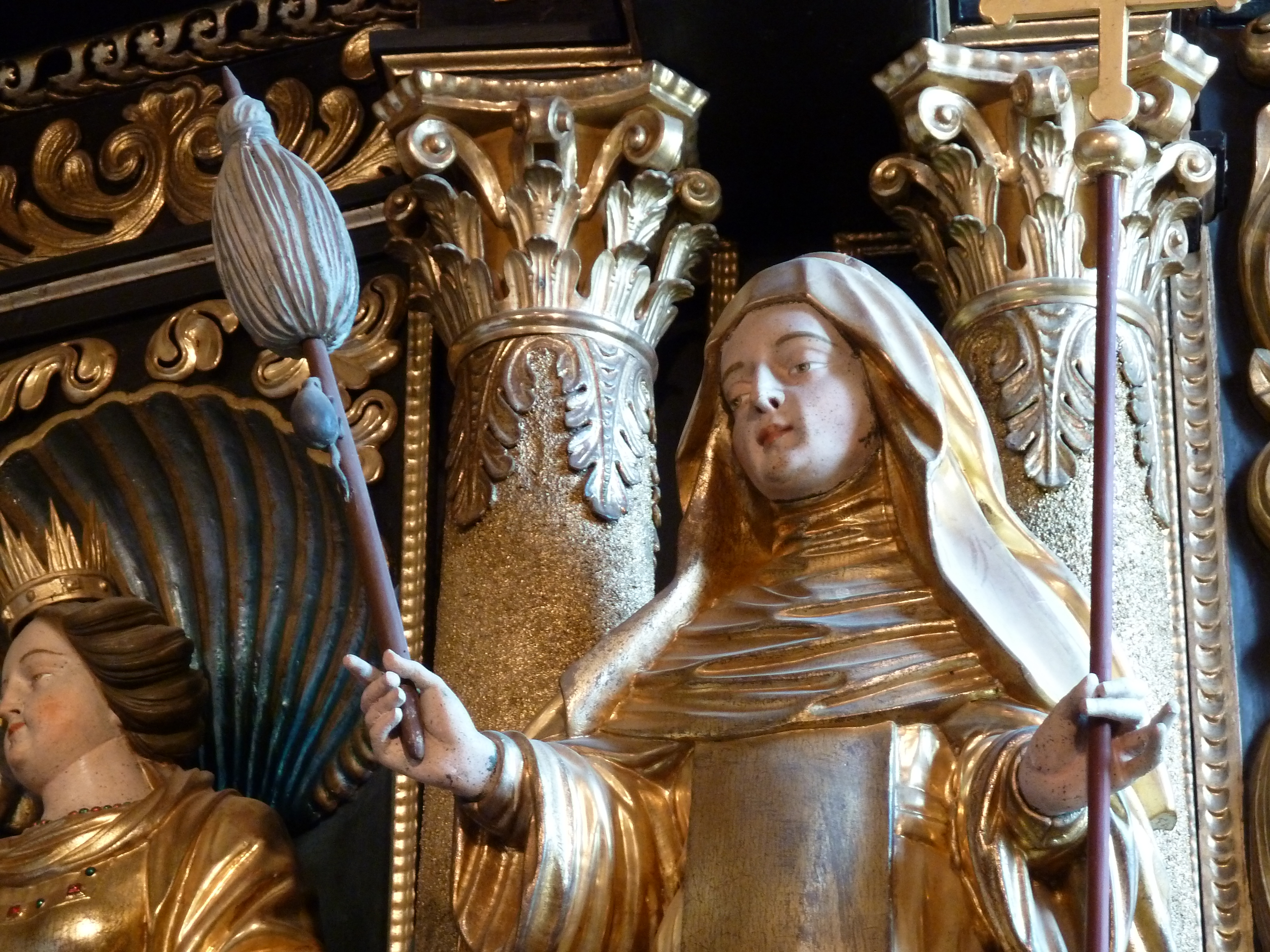 Am Hauptaltar Statue der hl. Gertrud mit Maus am Spinnrocken, den Faden abbeißend.